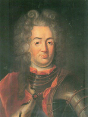 Vasily Fyodorovich Saltykov (1675—1751)